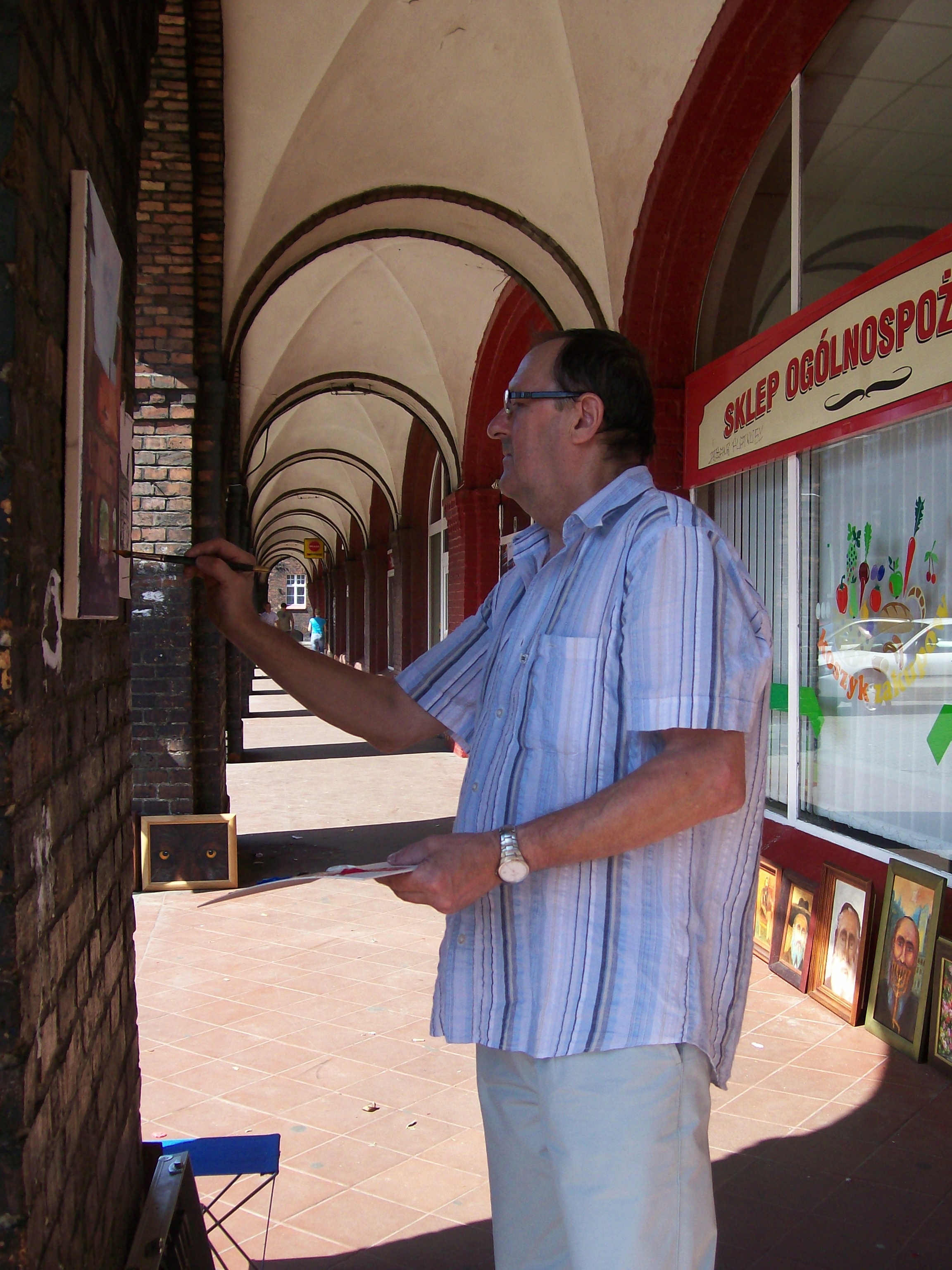 Helmut Matura, malarz z Grupy Janowskiej. Jarmark sztuki w połączeniu z odpustem w parafii Św. Anny - Janów-Nikiszowiec 27.07.2008